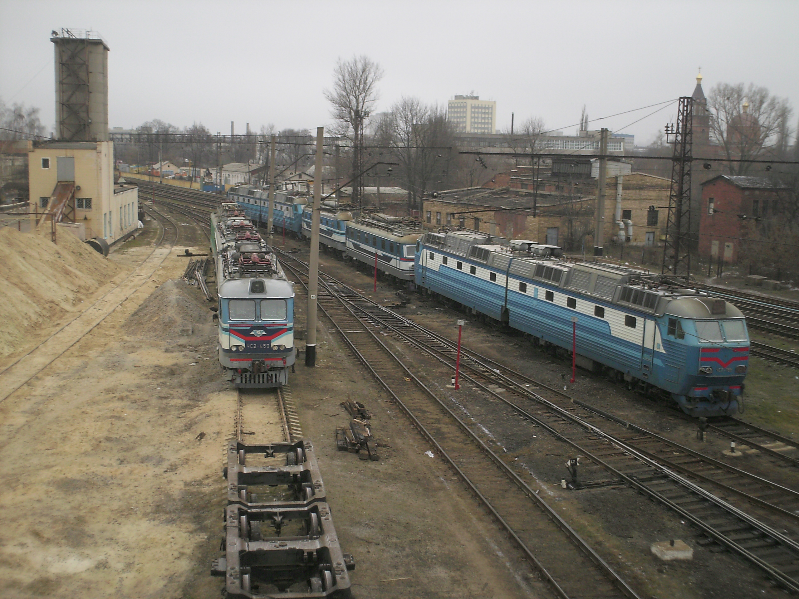 Локомотивное депо ТЧ-2 «Харьков-Главное» раньше «Октябрь» в Харькове. Электровозы ЧС2 и ЧС7